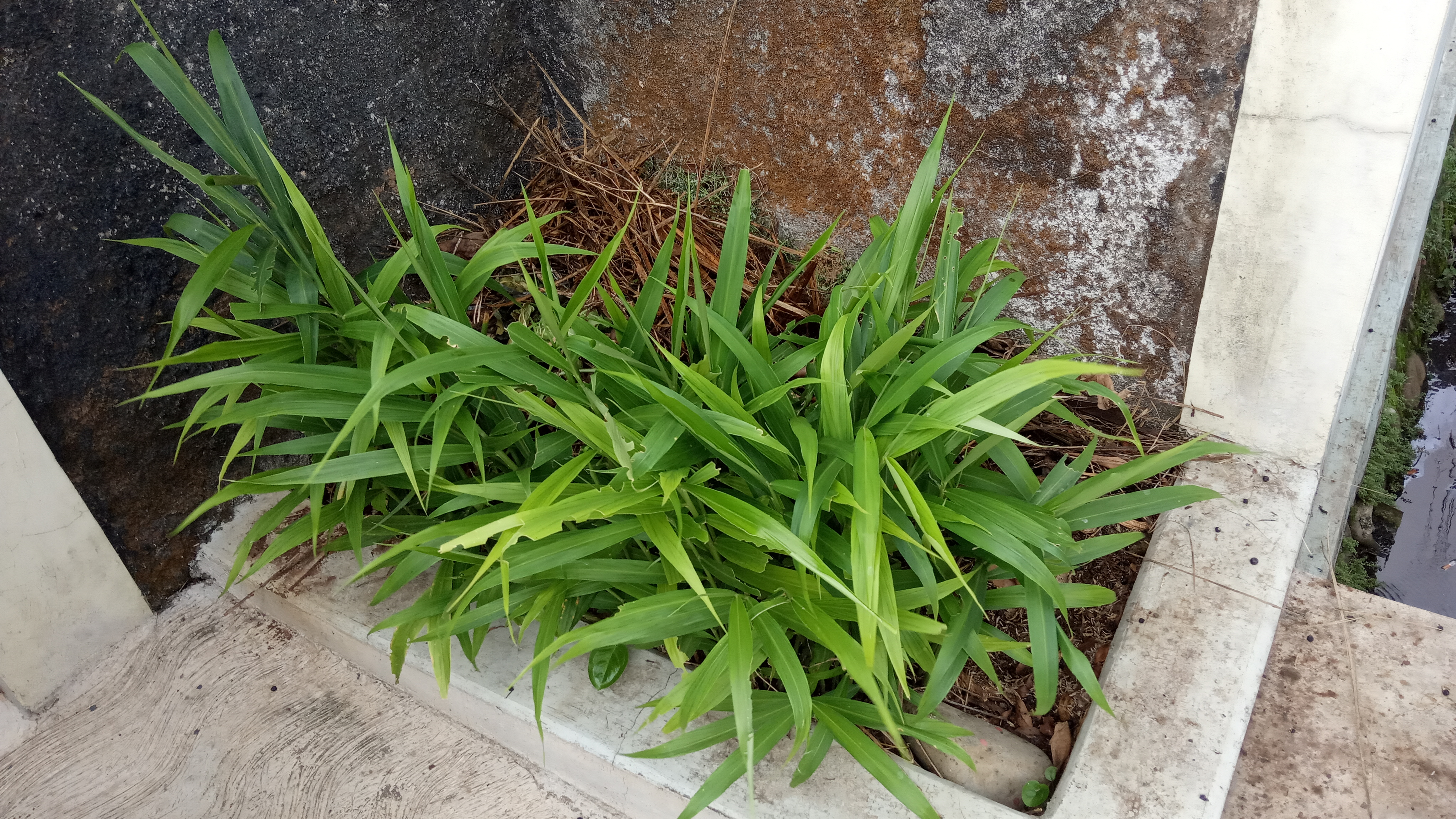 Tanaman Jahe Di Kebun SAP Garden Hidroponik